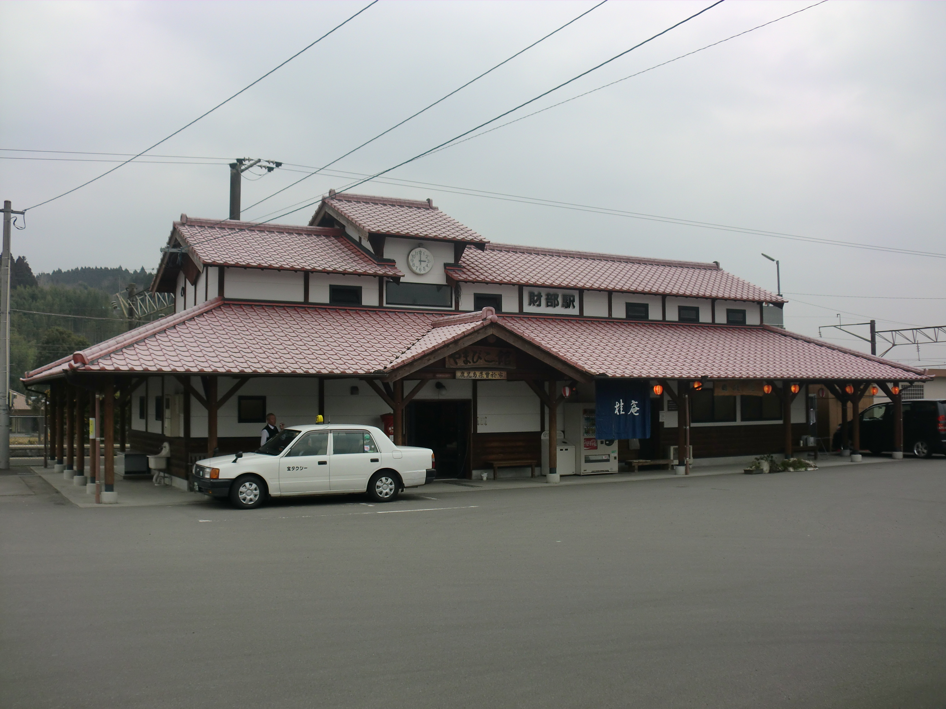 曽於市にあるJR日豊本線財部駅の駅舎